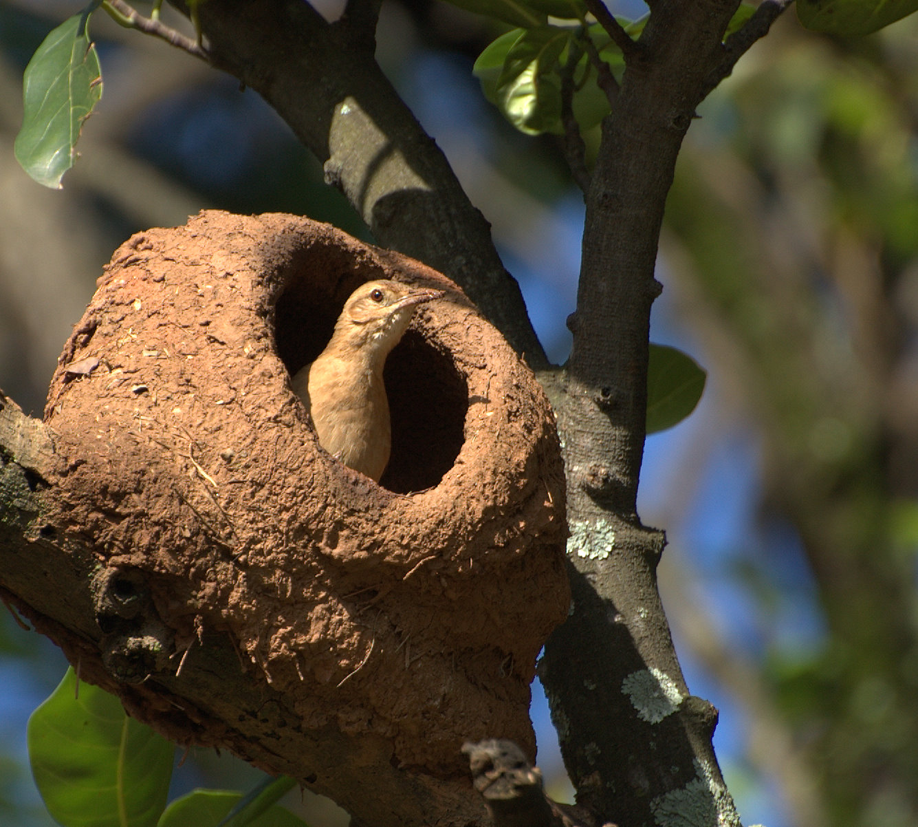 SÉRIE JOÃO-DE-BARRO Parque da Independência, Museu do Ipiranga, São Paulo